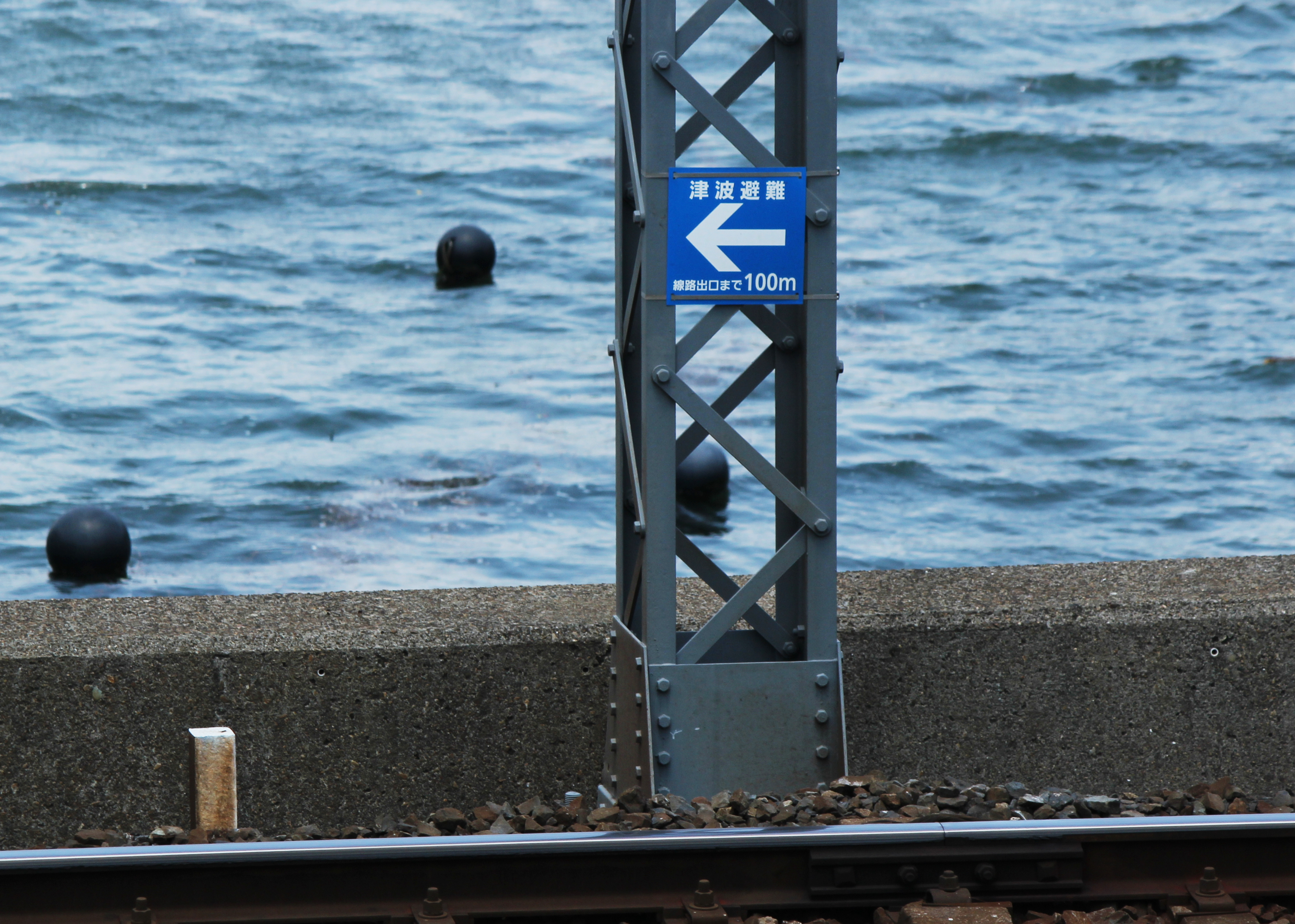 緊急避難誘導標（近鉄鳥羽線）